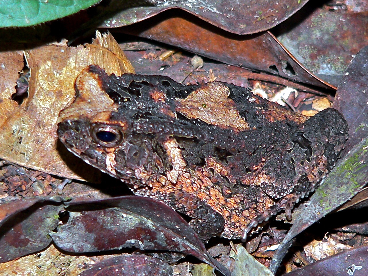 Korup NP, CAMEROON